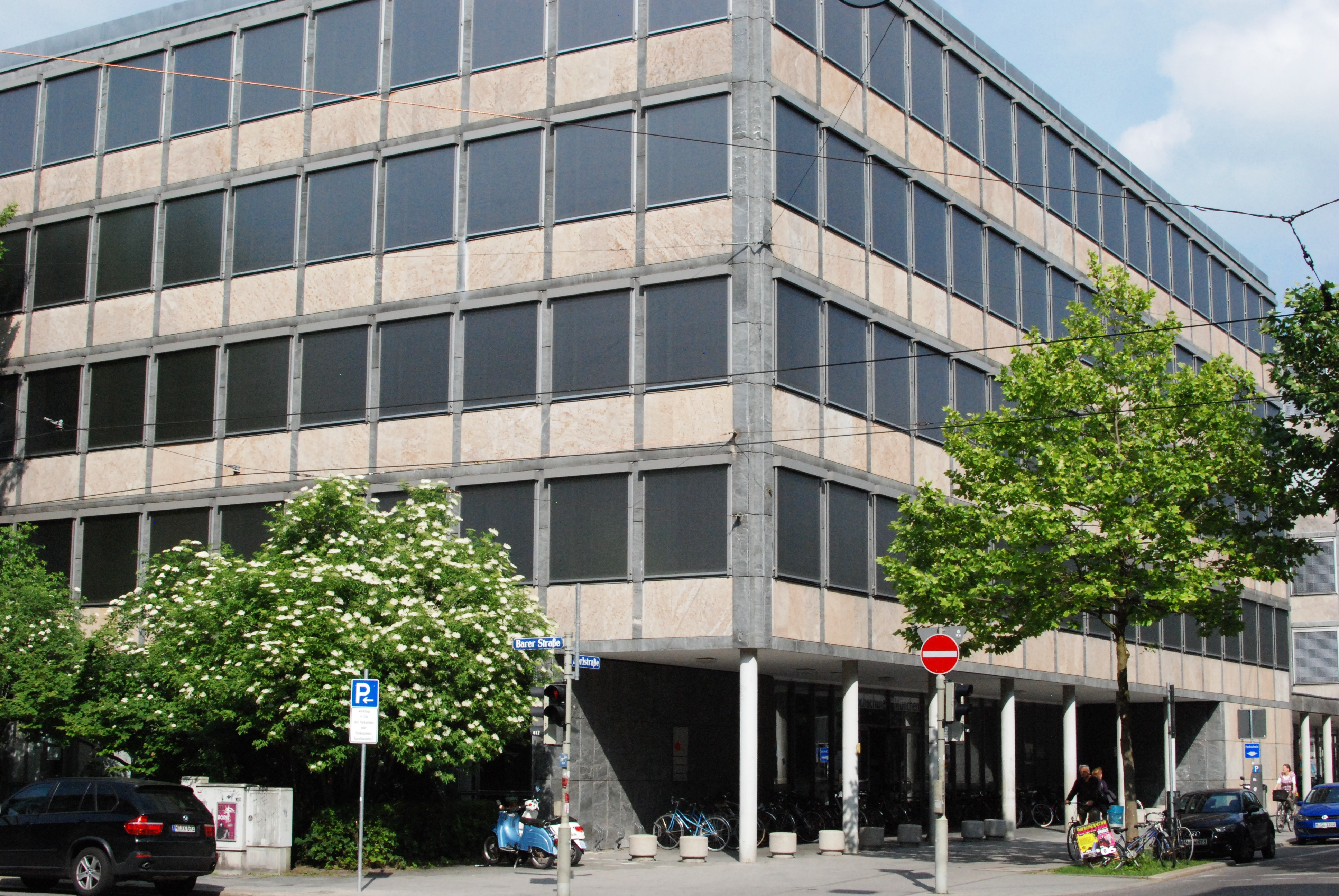 Südwestecke der ehemaligen Staatsbauschule München, jetzt "Campus Karlstraße" der Hochschule für angewandte Wissenschaften an der Karlstraße/Barerstraße im Stadtteil Maxvorstadt, München, Regierungsbezirk Oberbayern, Bayern. Als Baudenkmal unter Aktennummer D-1-62-000-7830 in der Bayerischen Denkmalliste aufgeführt. Erbaut 1954 bis 1957 von der Architektengemeinschaft Franz Ruf, Adolf Seifert und Rolf ter Haerst.